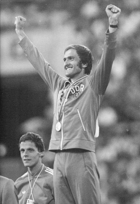 ADN-ZB Mittelstädt 01.08.80 Moskau: Olympia. Cierpinski widerholte Olympiasieg von Montreal-Zum Abschluß der olympischen Leichtathletik-Wettbewerbe holte sich Waldemar Cierpinski (DDR) die Goldmedaille auf der klassischen Marathon-Distanz (42,195 km). Der jubelnde 29jährige Hallenser ist damit nach Abebe Biklia der zweite Marathonläufer, der seinen Olympiasieg wiederholen konnte. Links der zweitplazierte Gerard Nijboer (Niederlande).